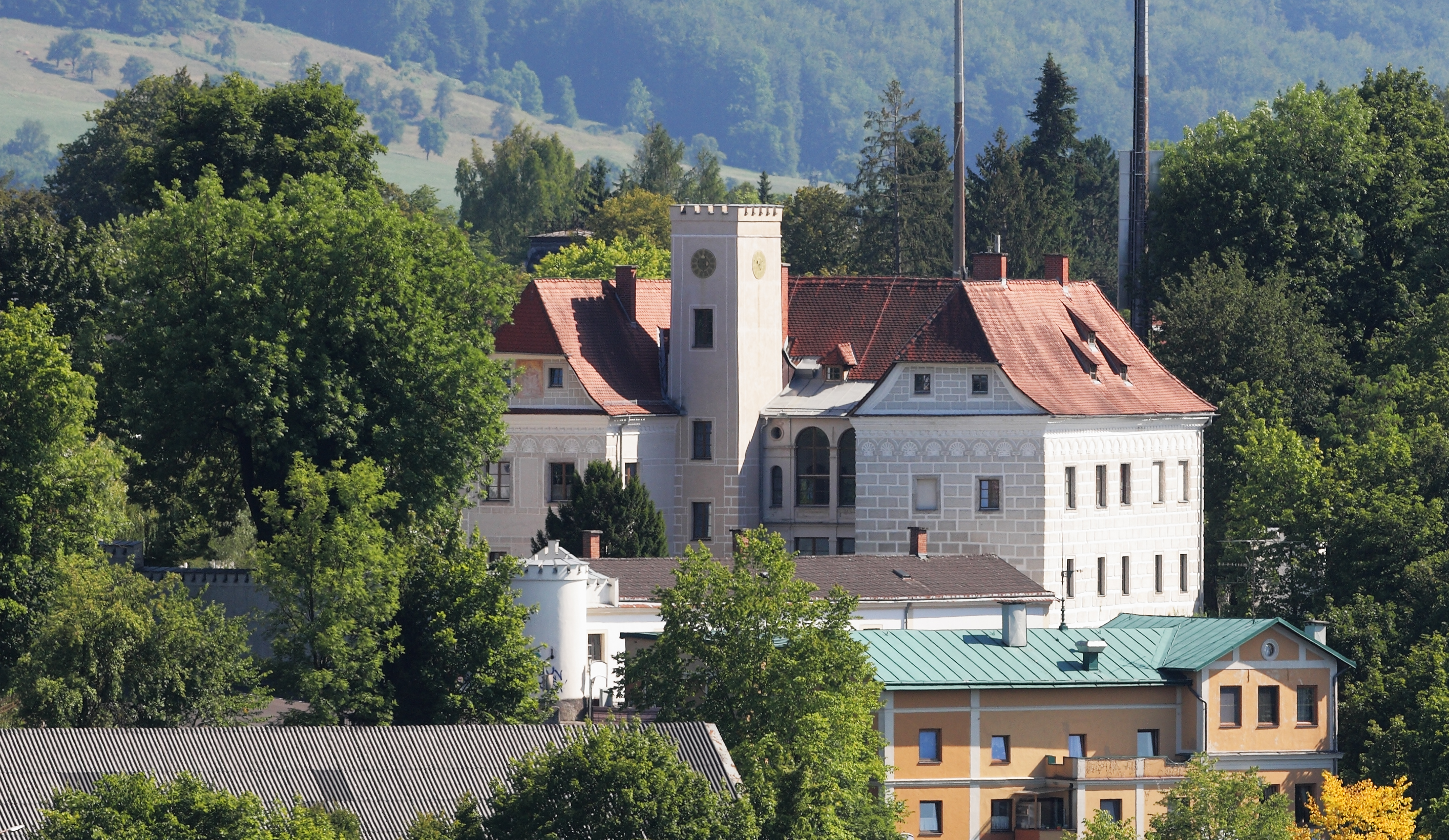 Steyr: Blick von der Seifentruhe (Voralpen Straße B 122) auf Schloss Engelseck. Ausschnitt aus einer Aufnahme mit einem 200mm-Teleobjektiv